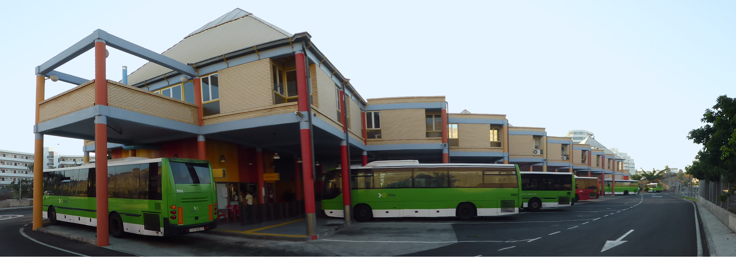 Busbahnhof (estación de guaguas) in Playa de la Américas (Tenerife Sur).